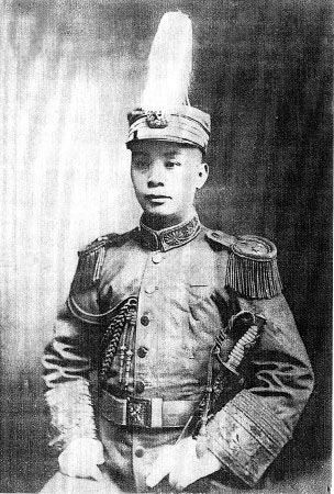 这是卢焘将军于1921年3月担任黔军总司令时的纪念照，由身份不明的摄影师拍照，早已进入公共领域。